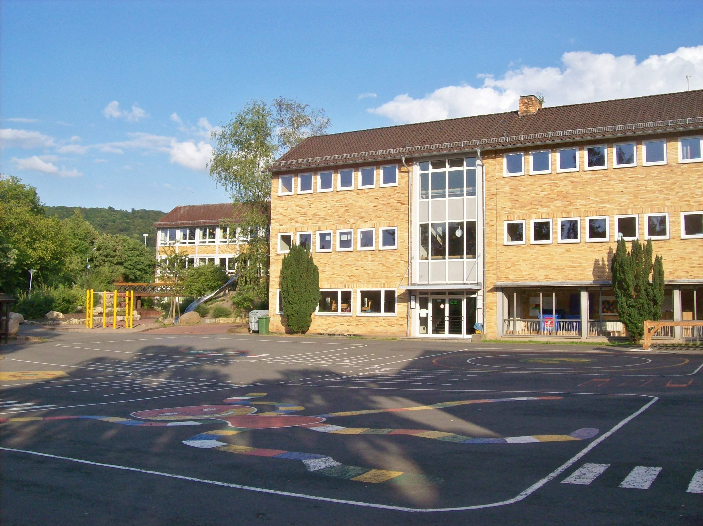 Grundschule "Am Sonnenberg" in Bovenden, erbaut im Jahre 1960. Einzug der Schule im August 1962. das Bild stammt aus dem Jahr 2009.